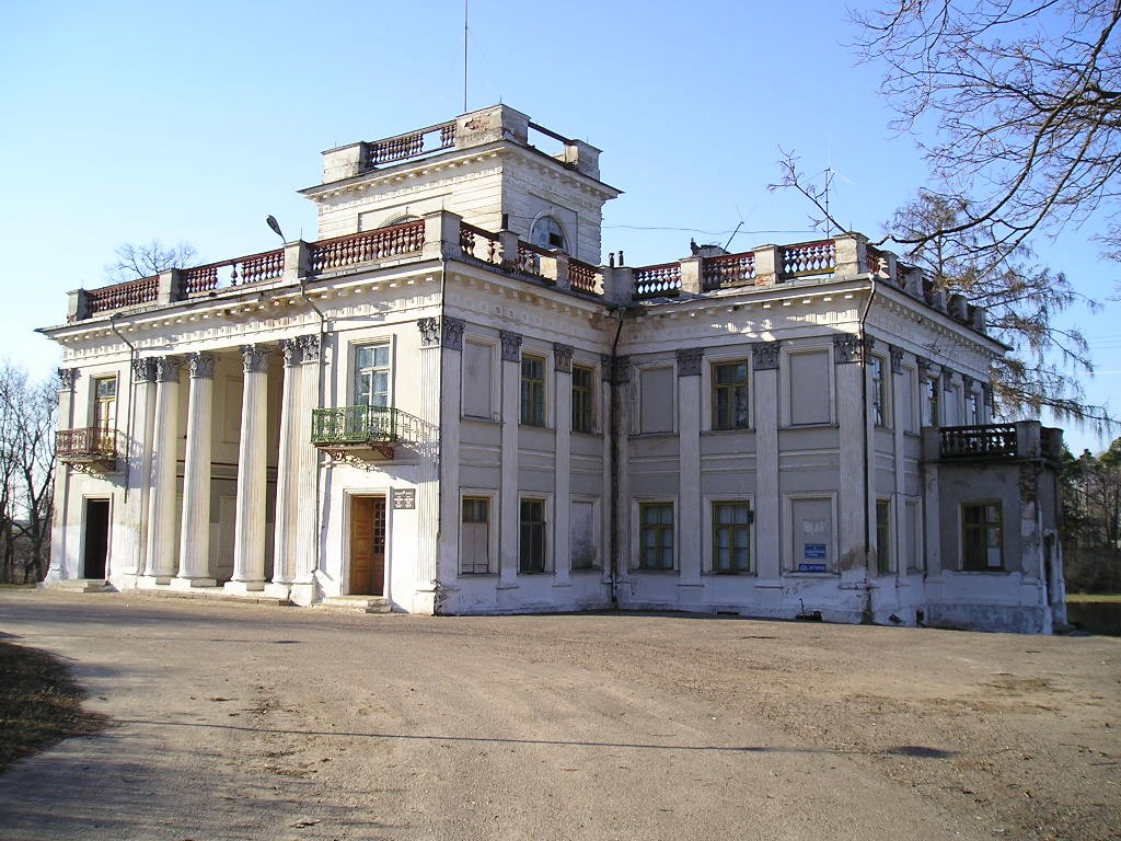 Żemłosław-Umiastowcy's Palace